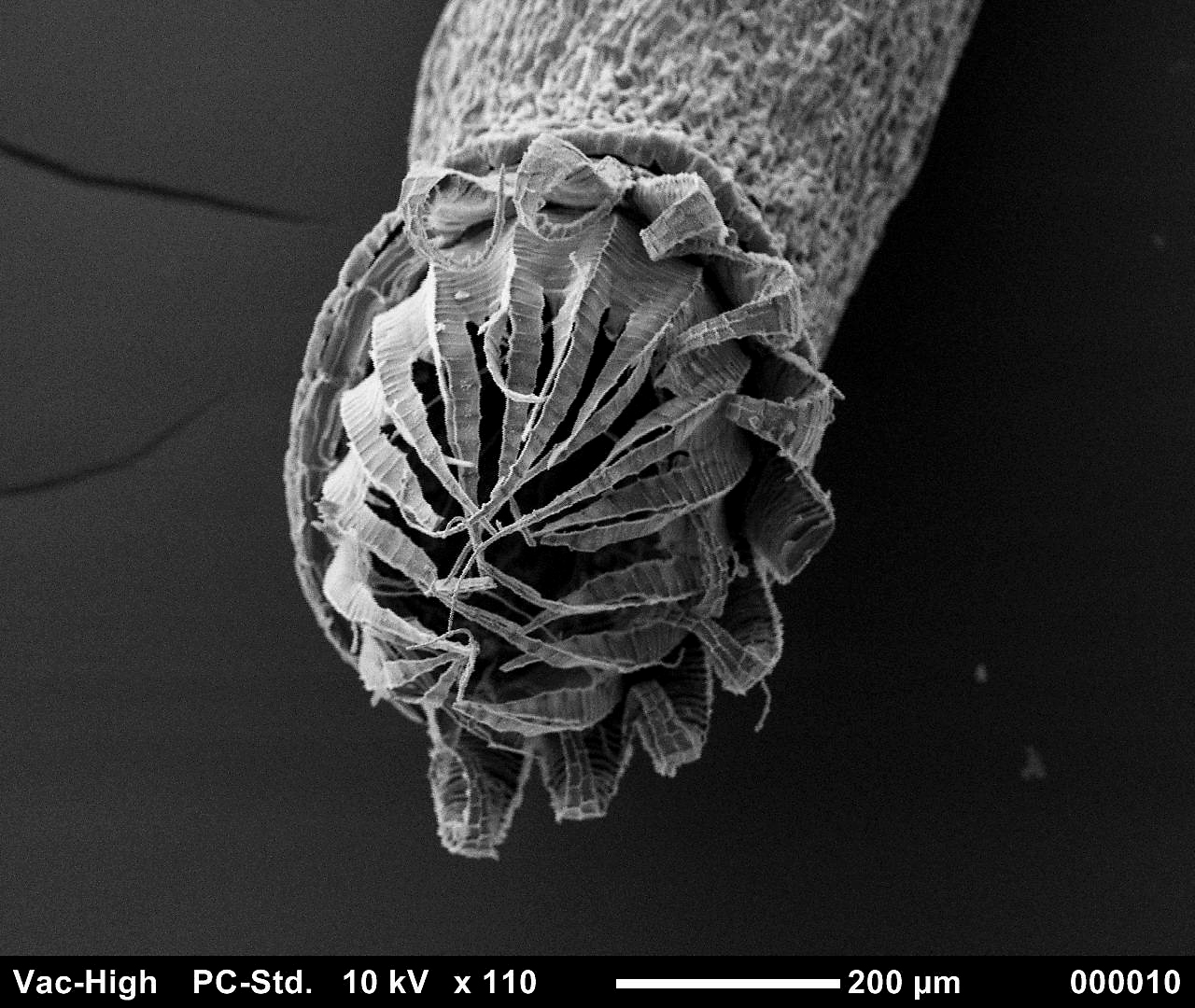 Peristom der Mooskapsel